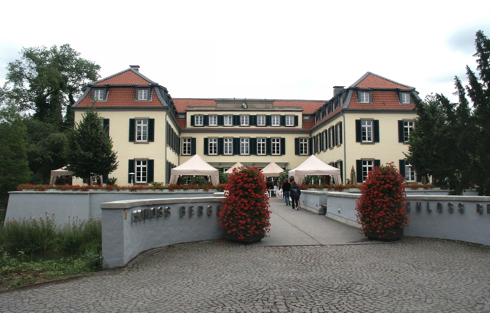 Description: Castle Berge in Gelsenkirchen, Germany Capture date: 23. Jul. 2005 Photographer: Sir Gawain